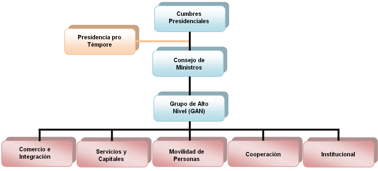 Estructura jerárquica de la Alianza del Pacífico.